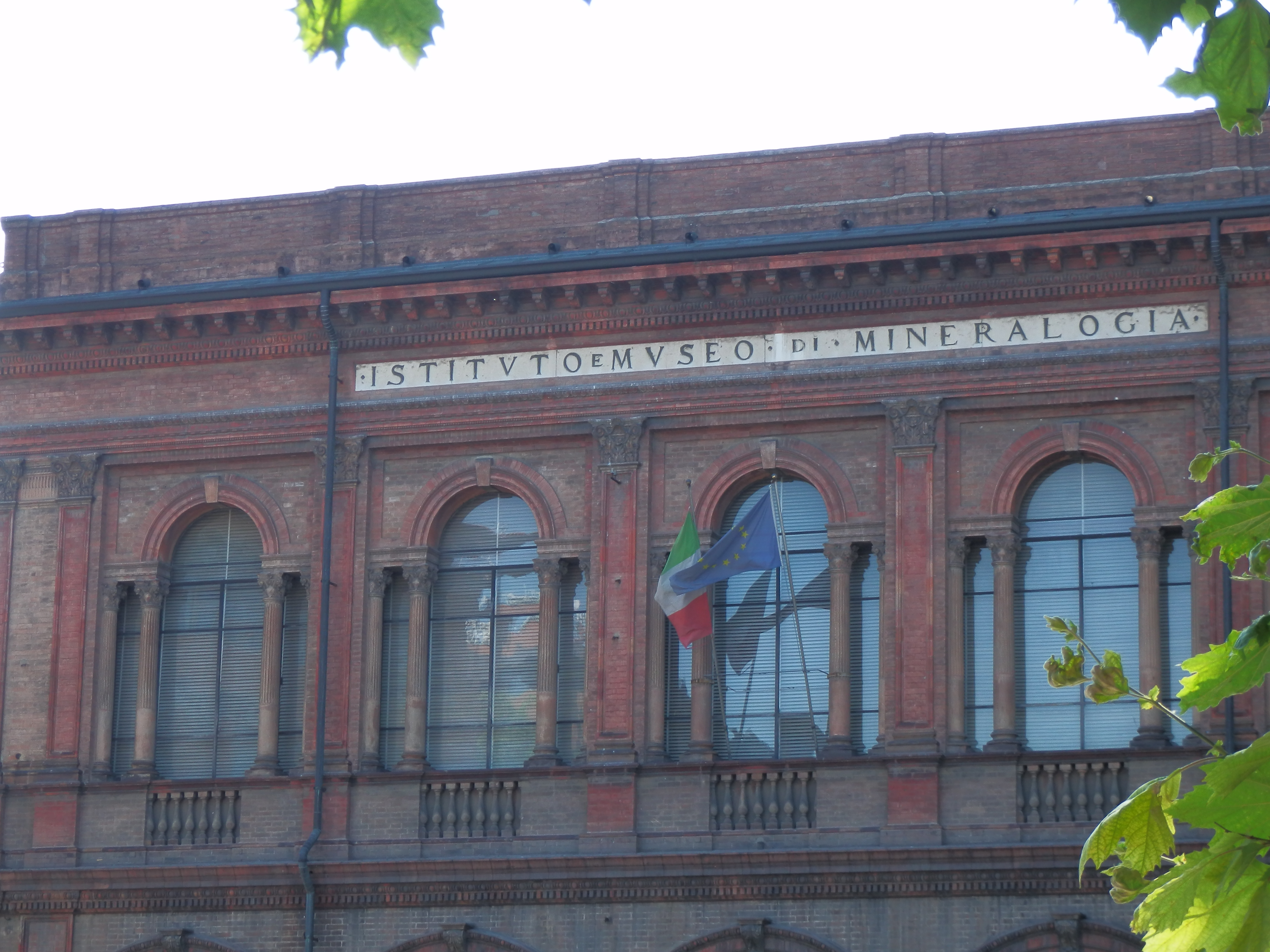 Istituto Museo di Mineralogia. Bologna, Piazza di Porta San Donato.